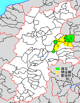 長野県北佐久郡の範囲 緑色が現在の範囲、黄色が明治中期の佐久郡の範囲 現在の佐久市は高瀬以南望月以東の元南佐久郡地域とそれ以外の元北佐久郡地域とに灰色線で分断される